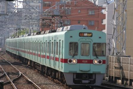 西鉄の快速急行旅客列車